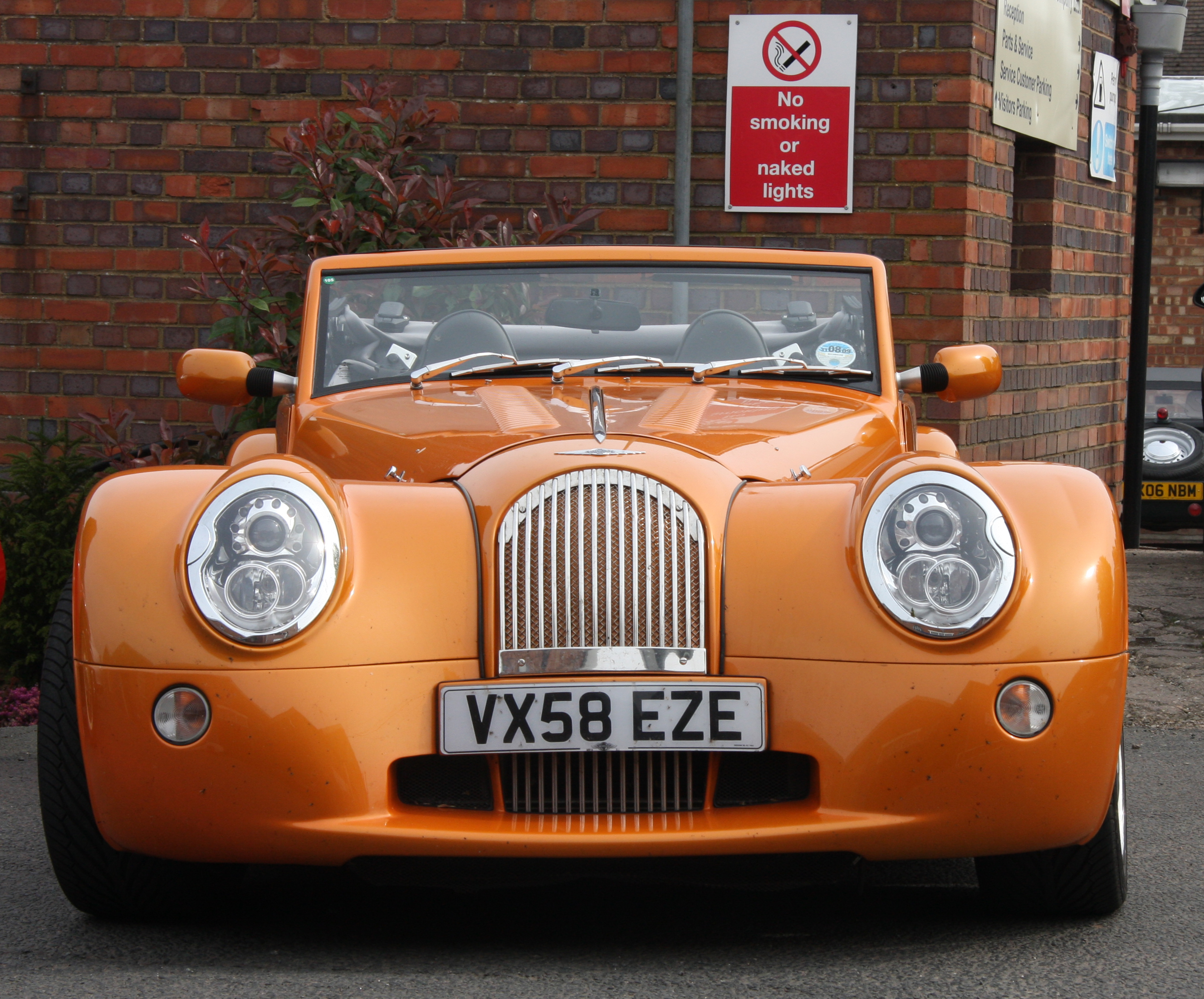 Morgan Aero 8